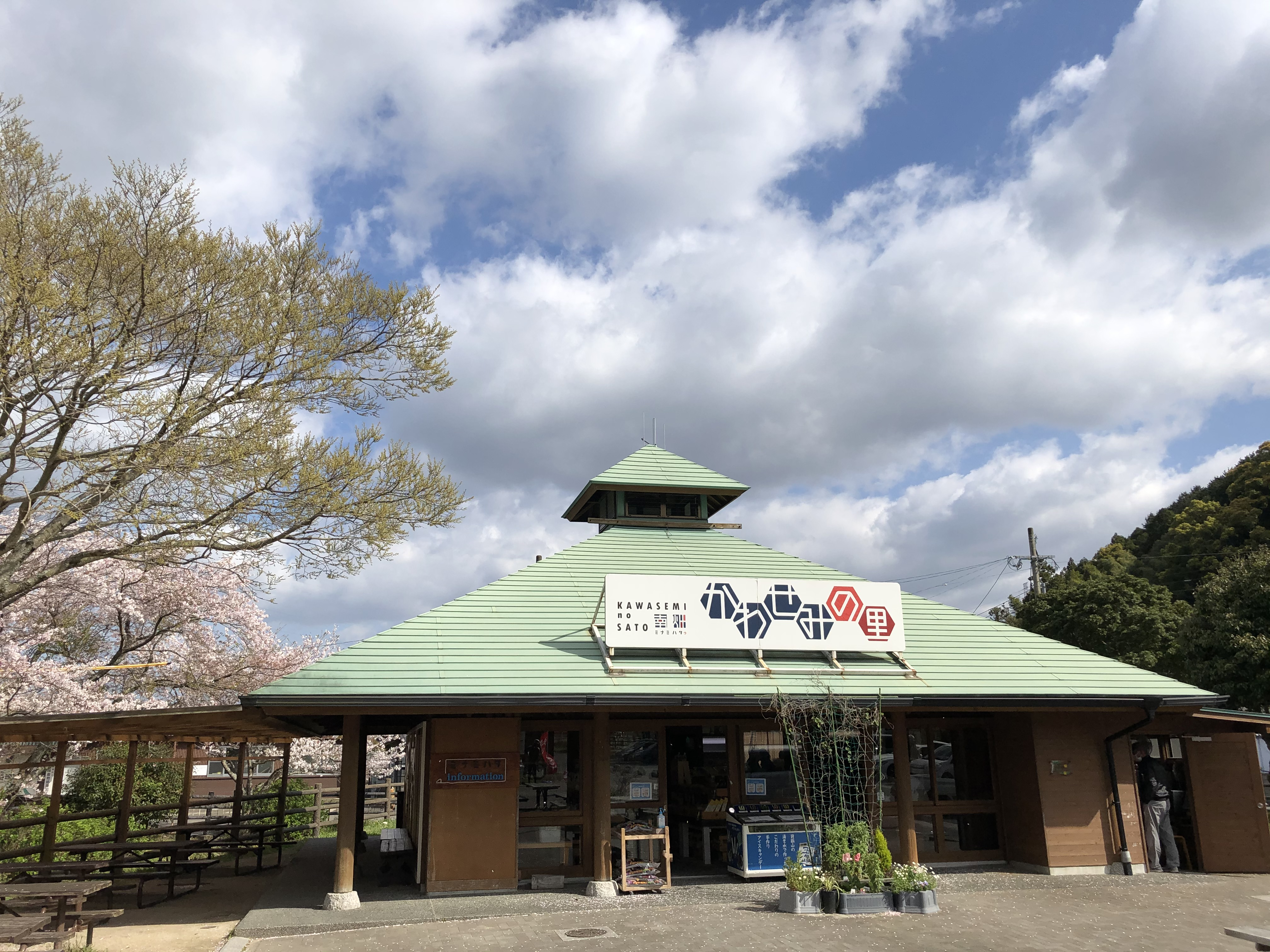 店内には、那珂川産の米、旬の野菜や果物などの農産物、加工品や惣菜なども販売してます。丹精込めて作られた商品をお試しください。